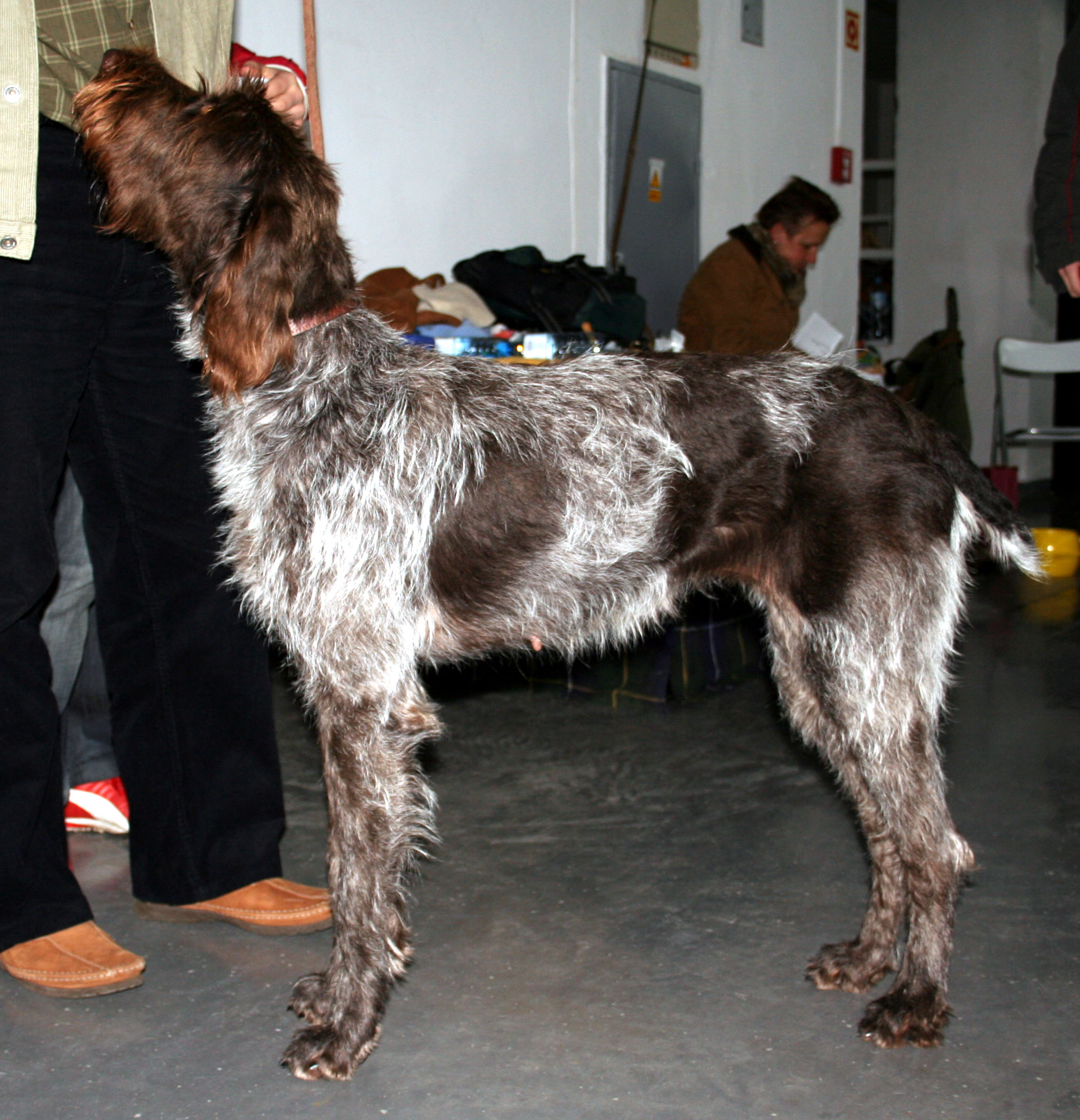 Czeski_fousek na Światowej Wystawie Psów Rasowych w Poznaniu